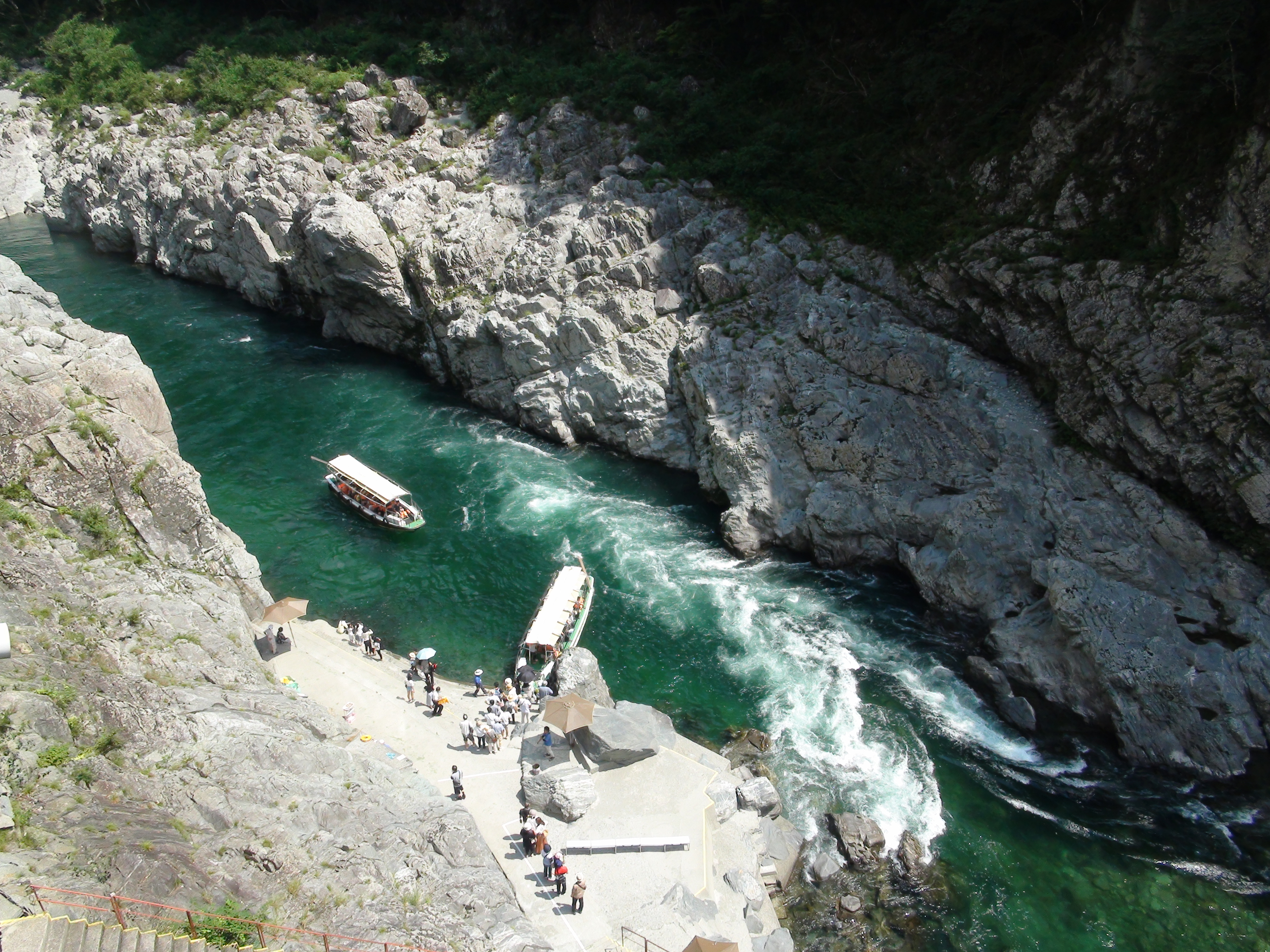 大歩危遊覧船（徳島県三好市）